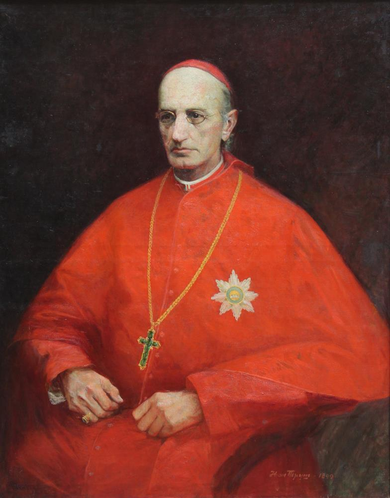 Митрополи́т Сильве́стр Сембрато́вич (у світі Сильве́стр Сембрато́вич, пол. Sylwester Sembratowicz; 3 вересня 1836, Дошниця, Західна Лемківщина — 4 серпня 1898, Львів) — єпископ Української Греко-Католицької Церкви, кардинал Католицької Церкви; з 5 травня 1885 року Митрополит Галицький, Архієпископ Львівський та Єпископ Кам'янецький — предстоятель Української Греко-Католицької Церкви.